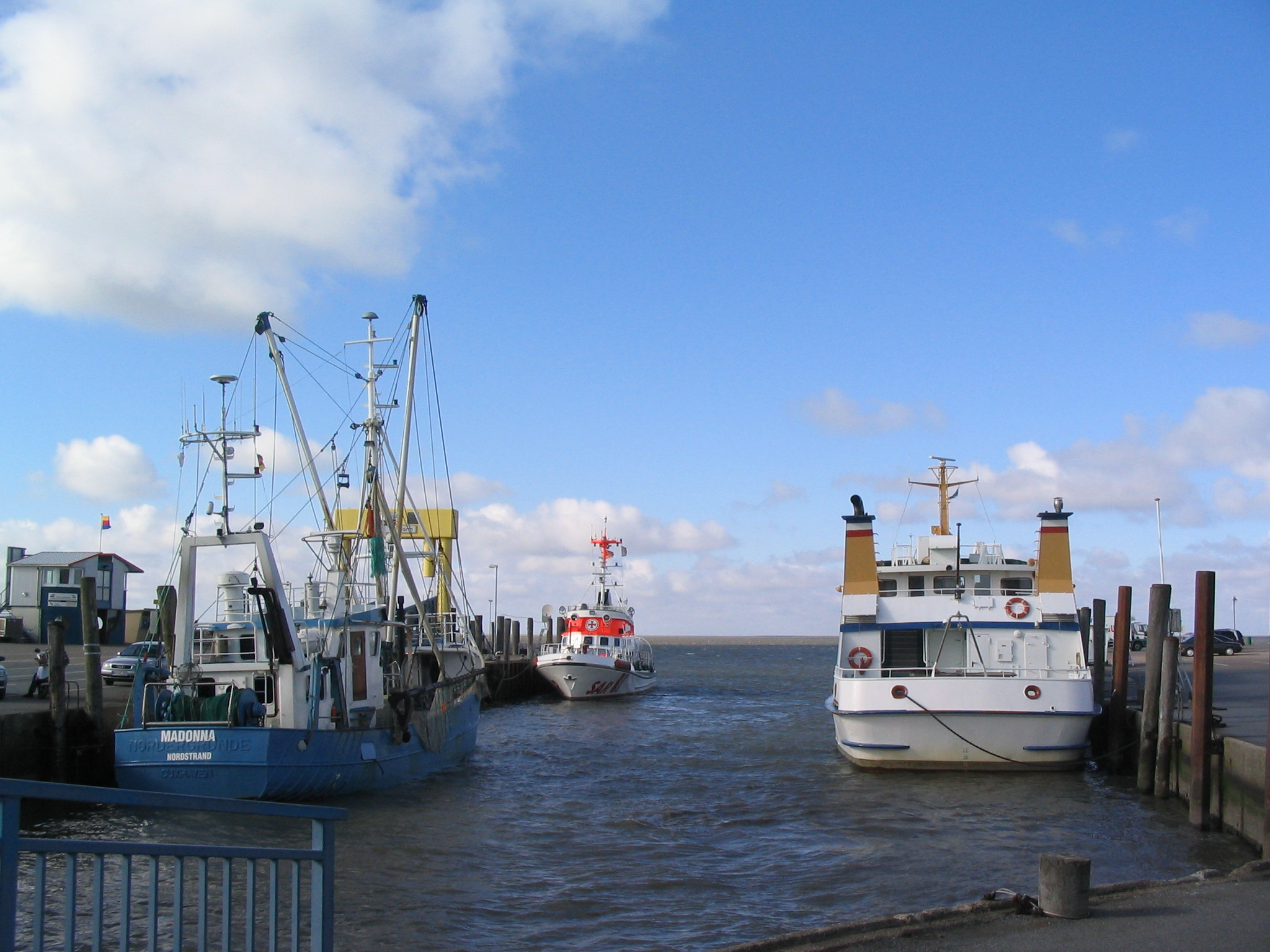 Strucklahnungshörn, Nordstrand